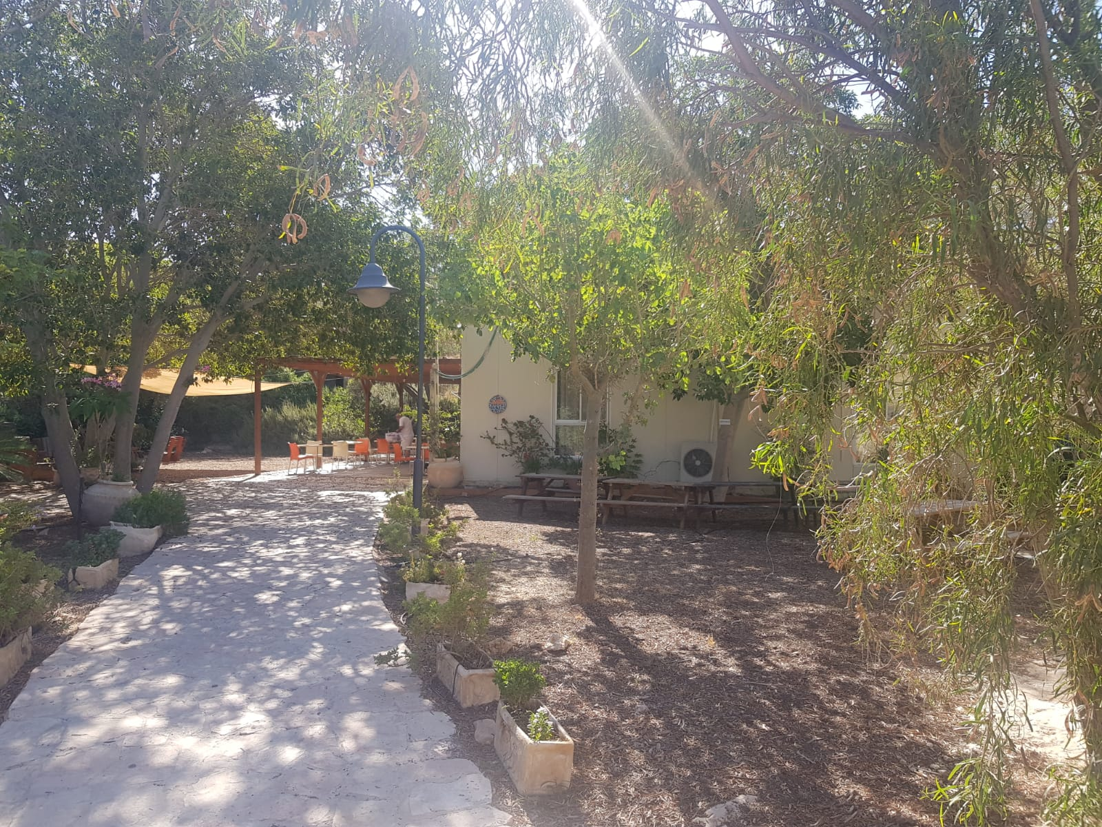 הכניסה למדרשה יישוב אלון